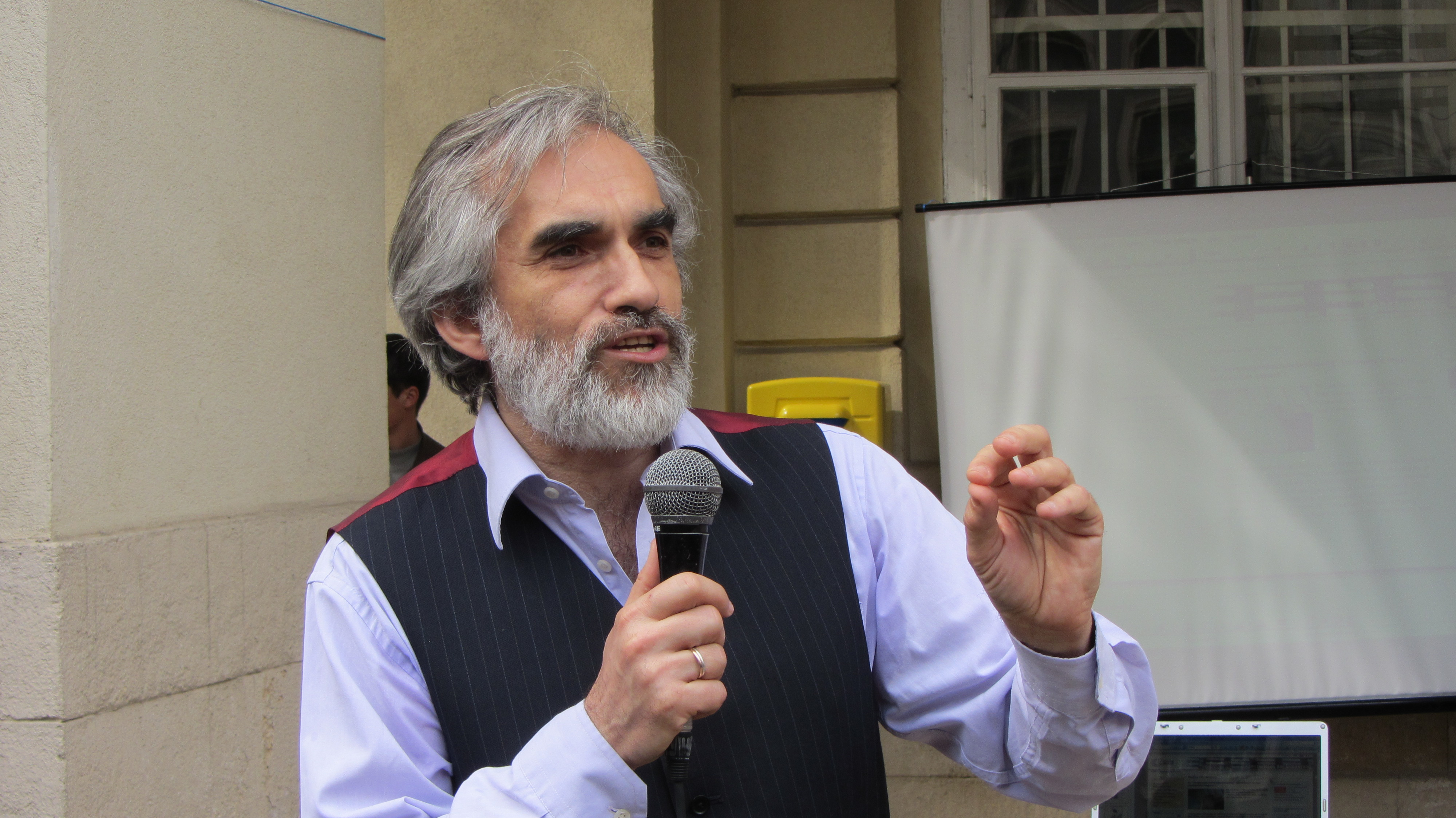 Ярослав Грицак: Ярослав Грицак на першому занятті вуличного університету у Львові 22.04.2012 р. читає лекцію "Як подолати історію?"